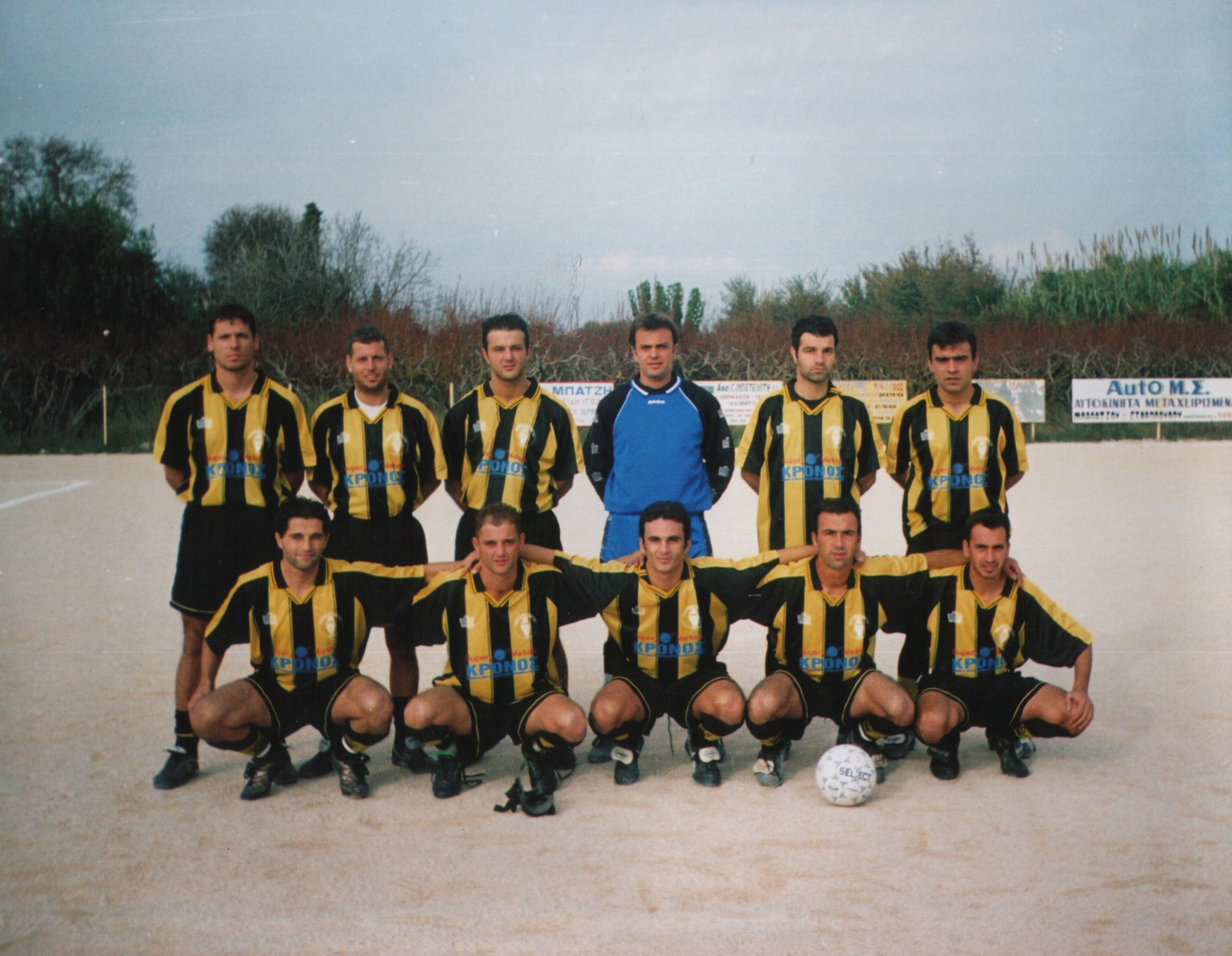 Φωστήρας Οβρυάς πρωταθλητής Αχαΐας 2002-2003 Fostiras Ovryas champion in Achaea 2002-03